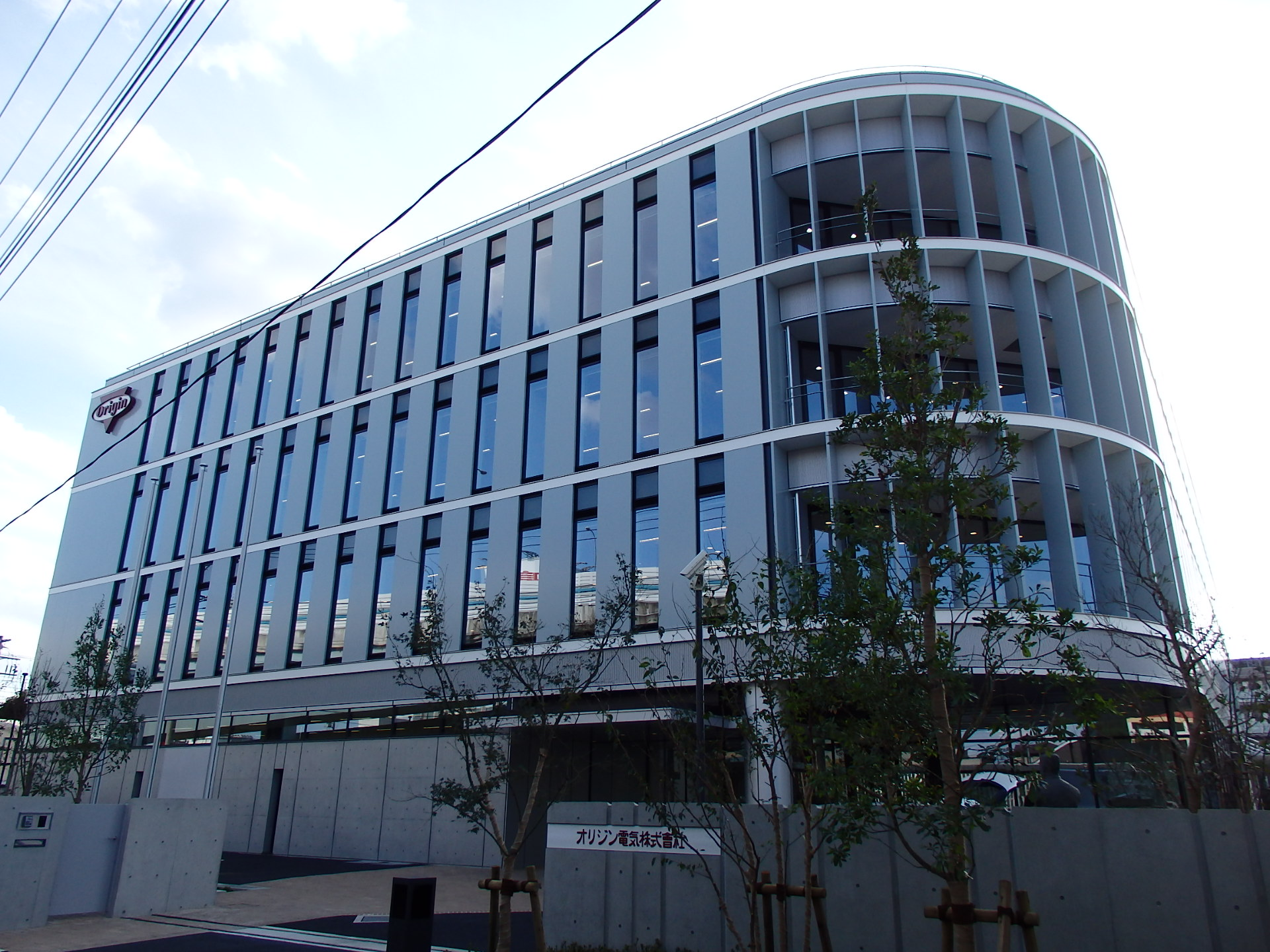 オリジン電気本社事業所